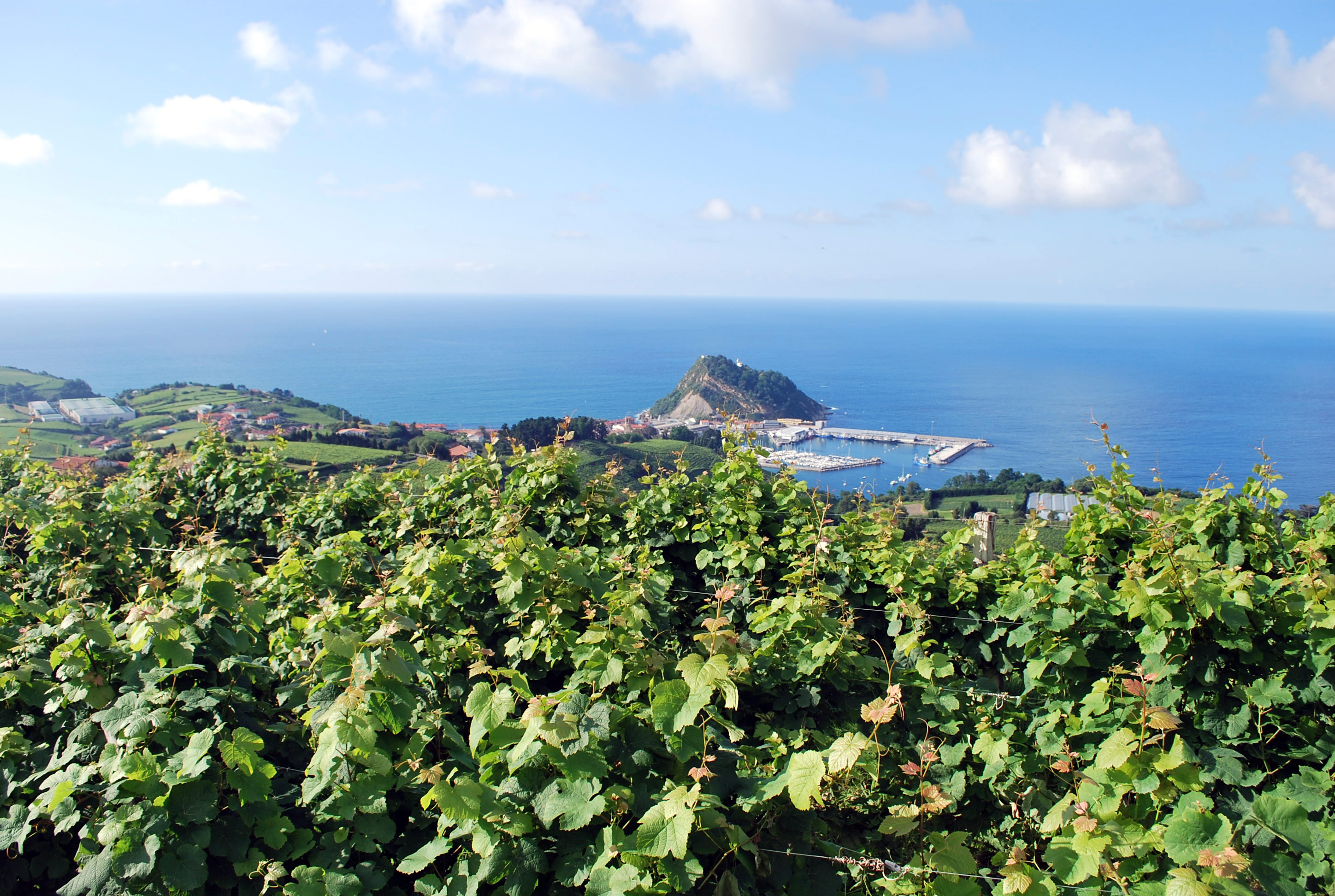 Le port de Getaria (Guipuscoa) vu depuis les hauteurs de Garate (282m). Au premier plan les vignobles du Txakolin.